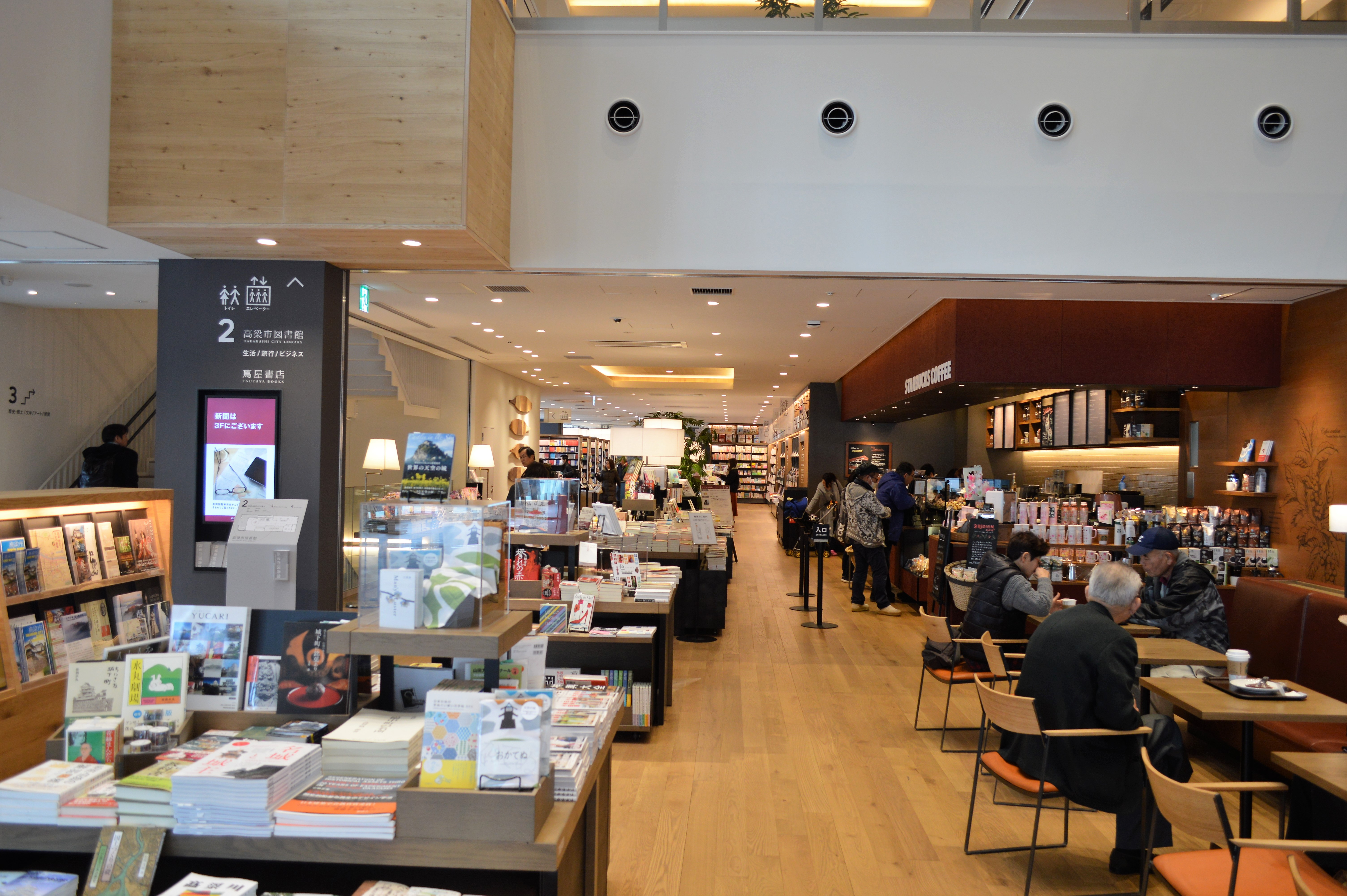 高梁市図書館にあるスターバックス。